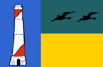 Bandera del municipio Mario Briceño Iragorri, estado Aragua, Venezuela